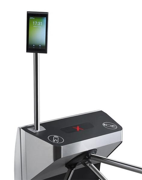 Турникет PERCo TTR-11 с терминалом распознавания лиц